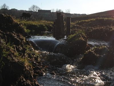 Rzeka Kacza na Dąbrowie nieopodal ul. Wiczlińskiej. autor:K.Pfeifer aparat:CannonA530 data wykonania zdjęcia: 2007-03-12